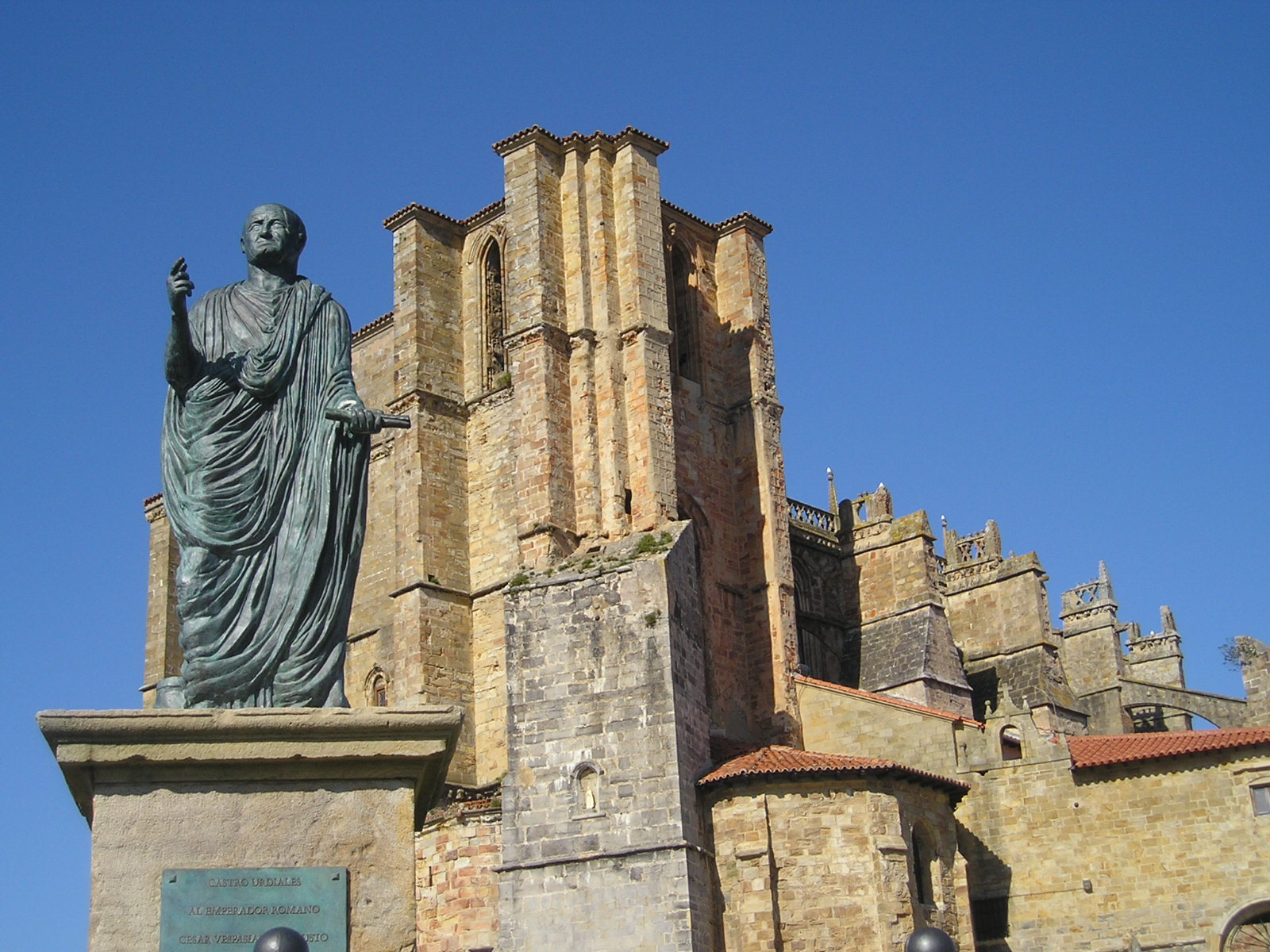 Castro Urdiales, localidad y municipio de Cantabria (España)